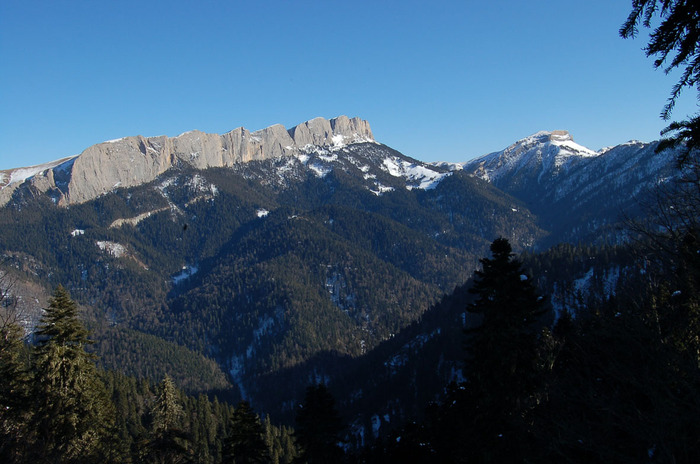 Monte Bolshói Tchaj.